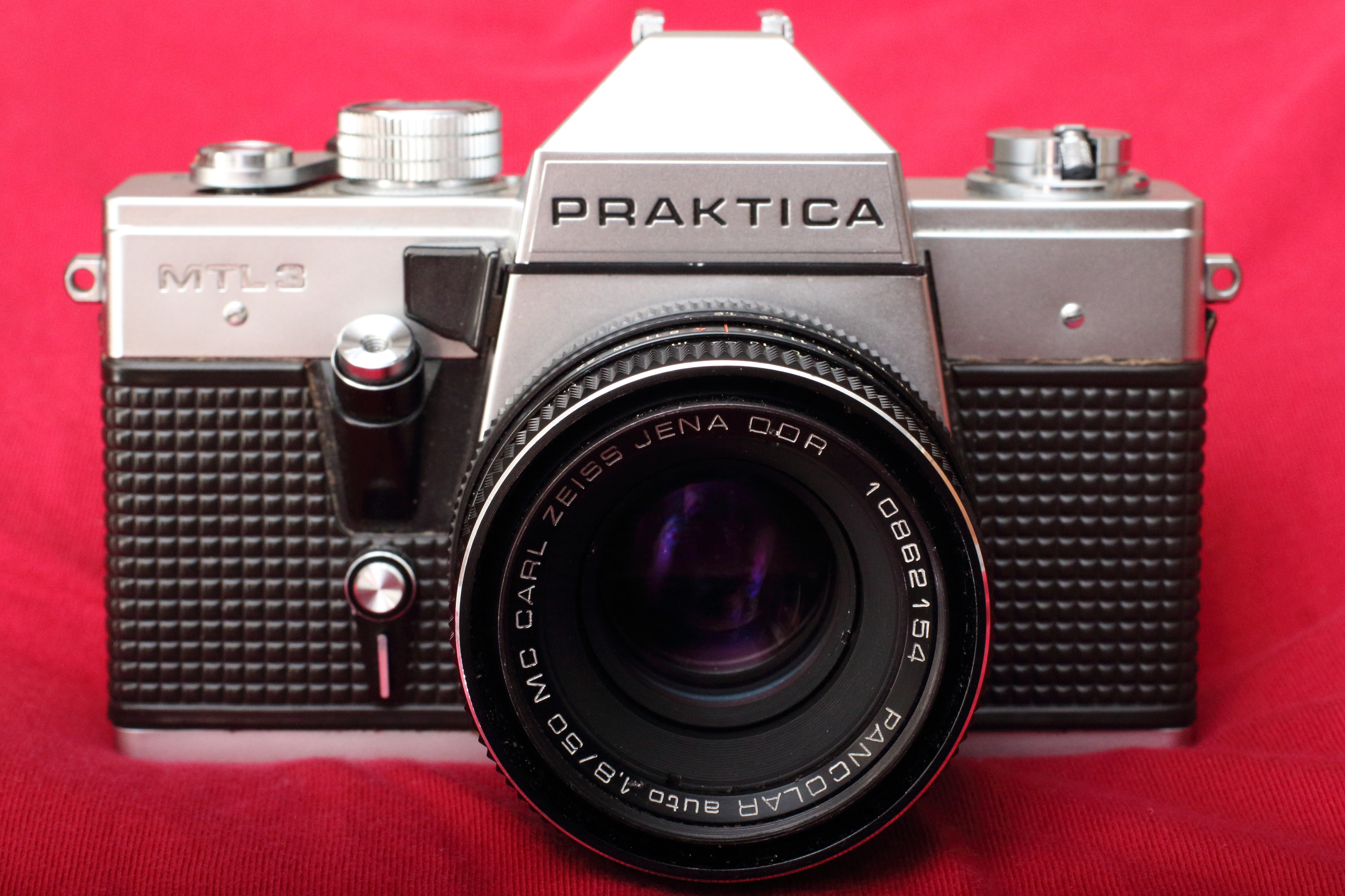 Praktica MTL-3 and MC Carl Zeiss Jena Pancolar auto 50mm 1.8